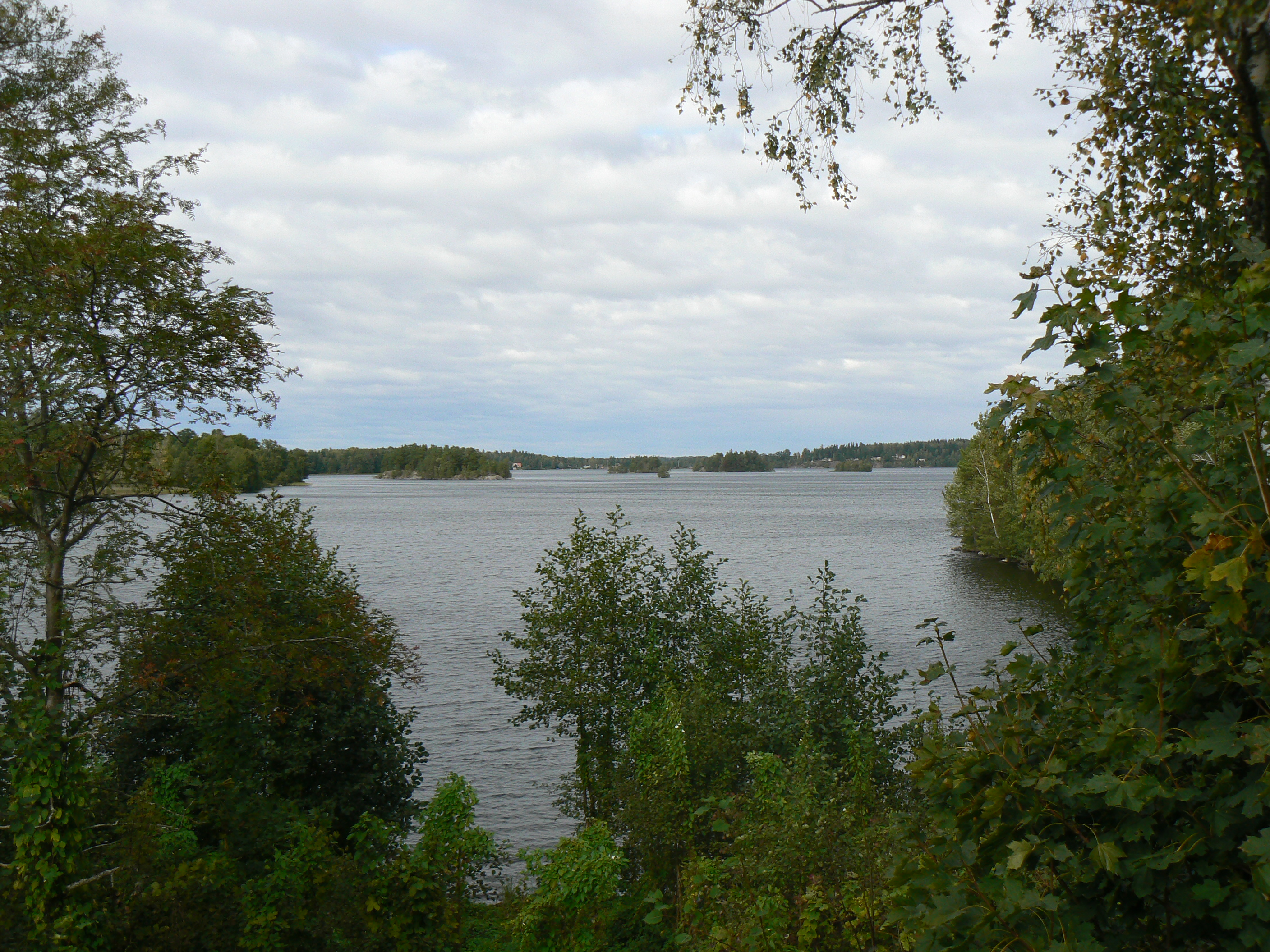 Lake Stora Rängen in Östergötland, Sweden.